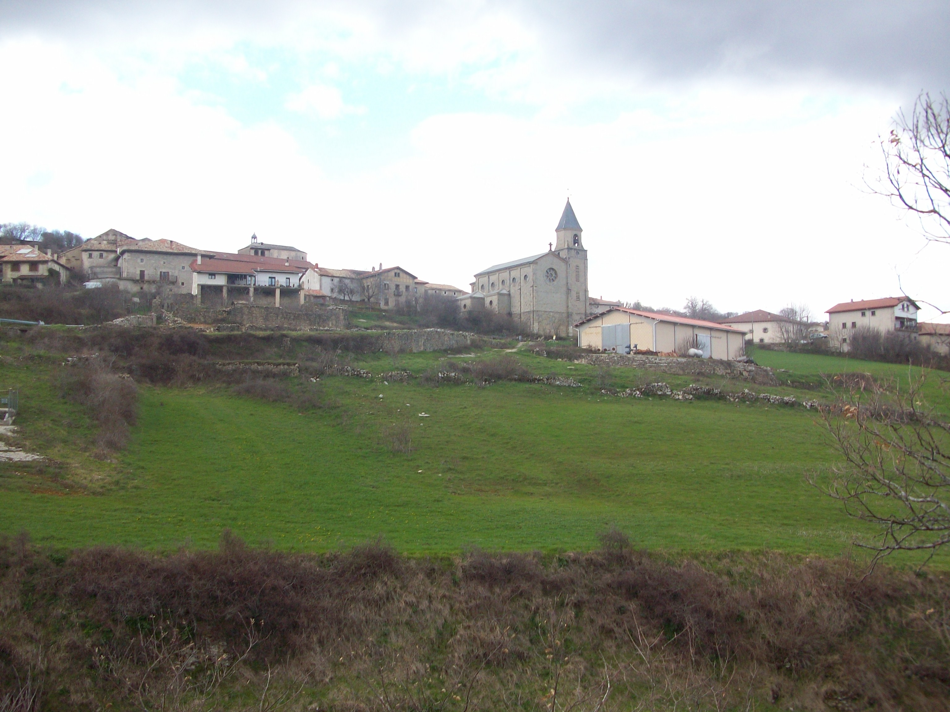 Goñi, Goñerri. Nafarroa, Euskal Herria. Goñi, Valley of Goñi. Navarre, Basque Country.